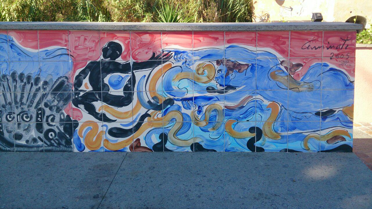 Opere artistiche presenti sulla passeggiata Eugenio Montale Foto scattata nel settembre 2016. This is a photo of a monument which is part of cultural heritage of Italy.